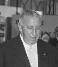 Belgische minister P. W. Segers opent tentoonstelling Belgische Week, Apollohal Amsterdam